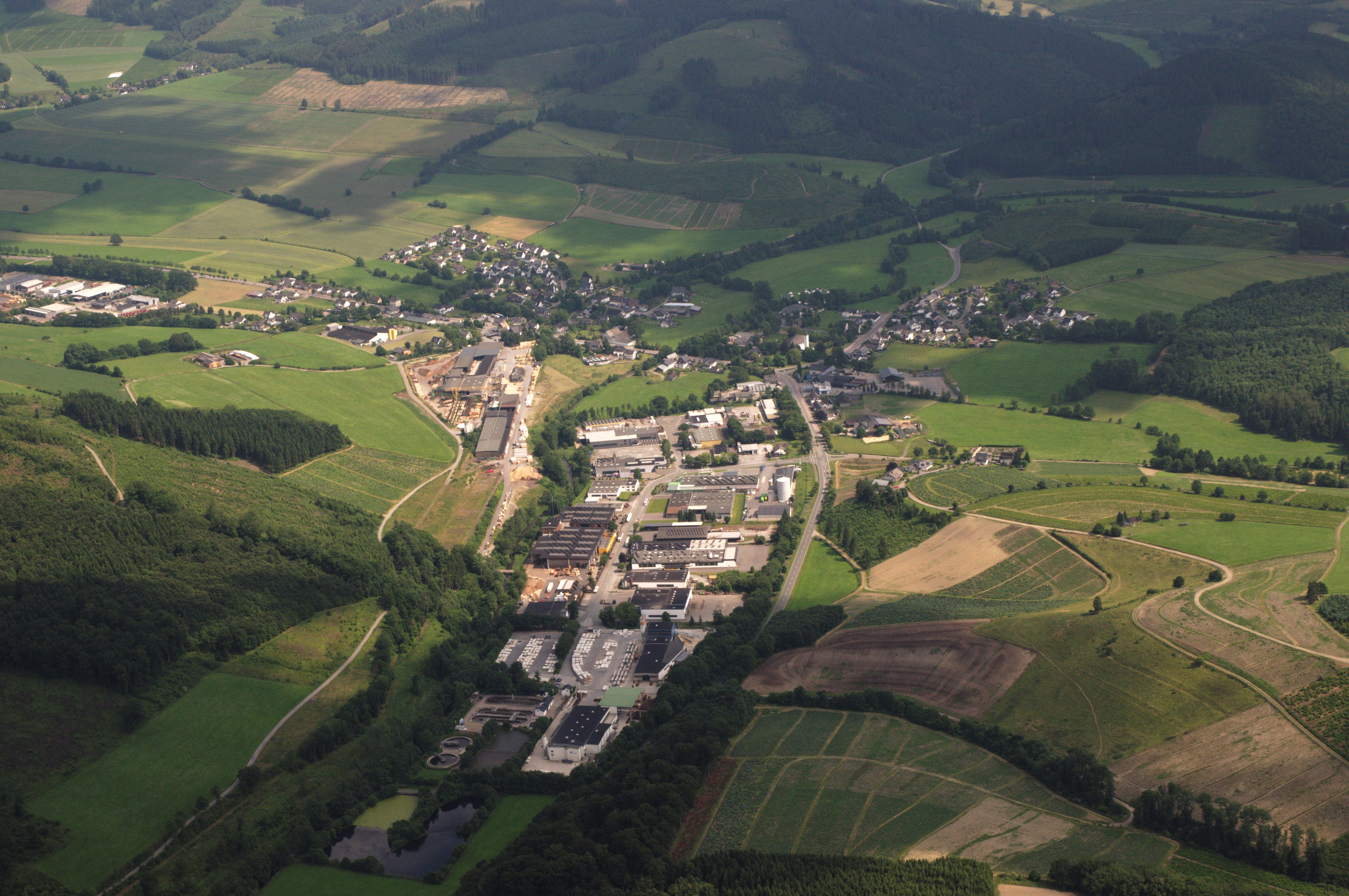 Fotoflug Sauerland-Ost: Gewerbegebiet Bremke